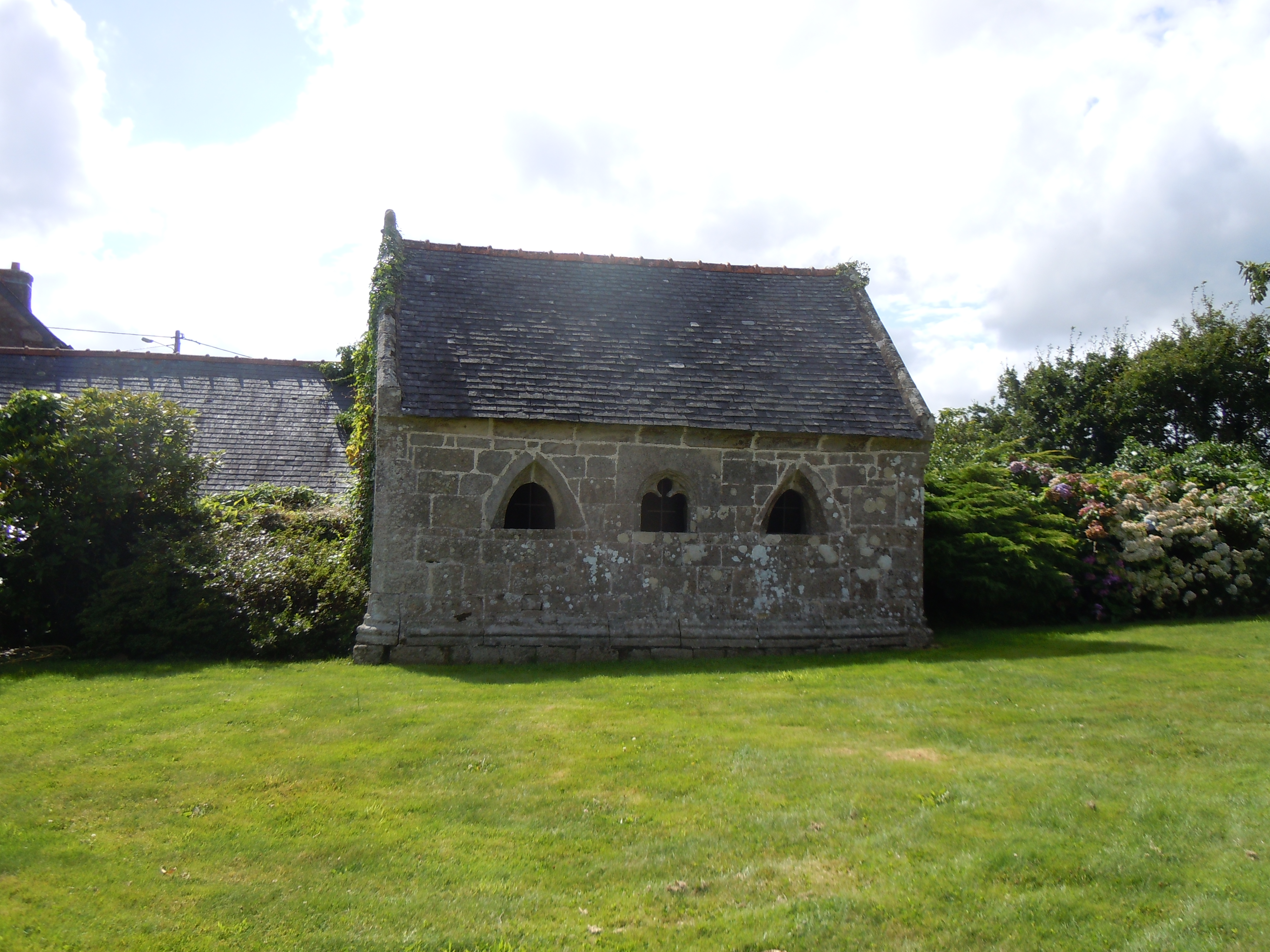 l'ossuaire de Trégornan-en-Glomel voisin de l'église Saint-Corentin (Côtes d'Armor)